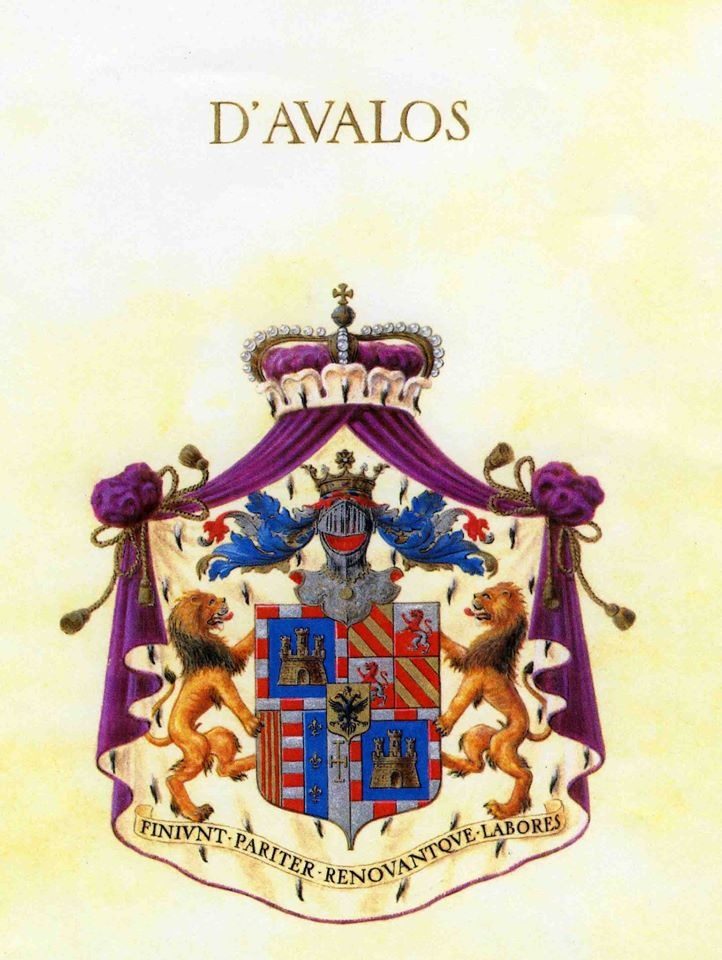 In alto lo stemma dei Principi d'Avalos, inquartato con i d'Aquino e i d'Aragona.